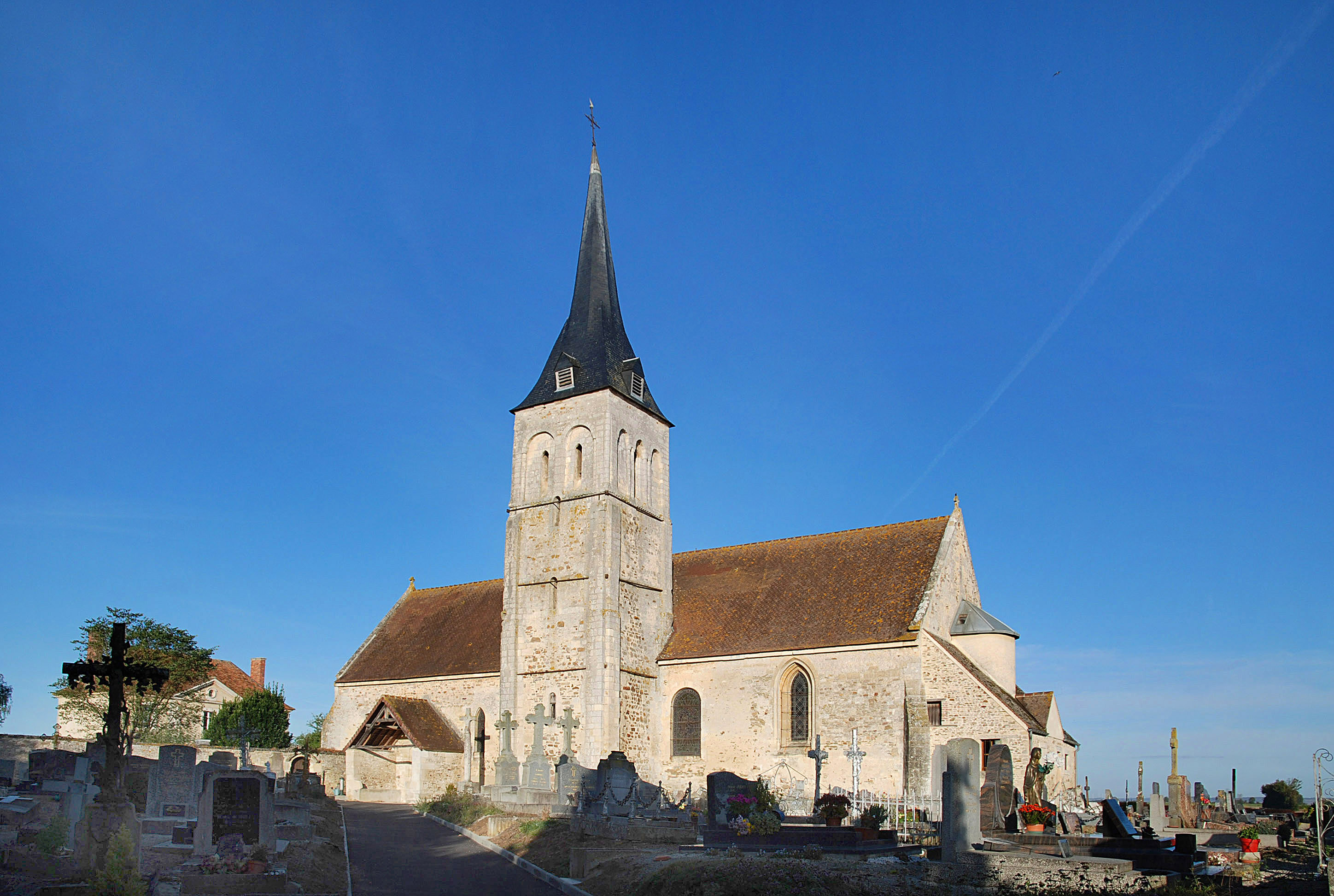 Merri (Orne)